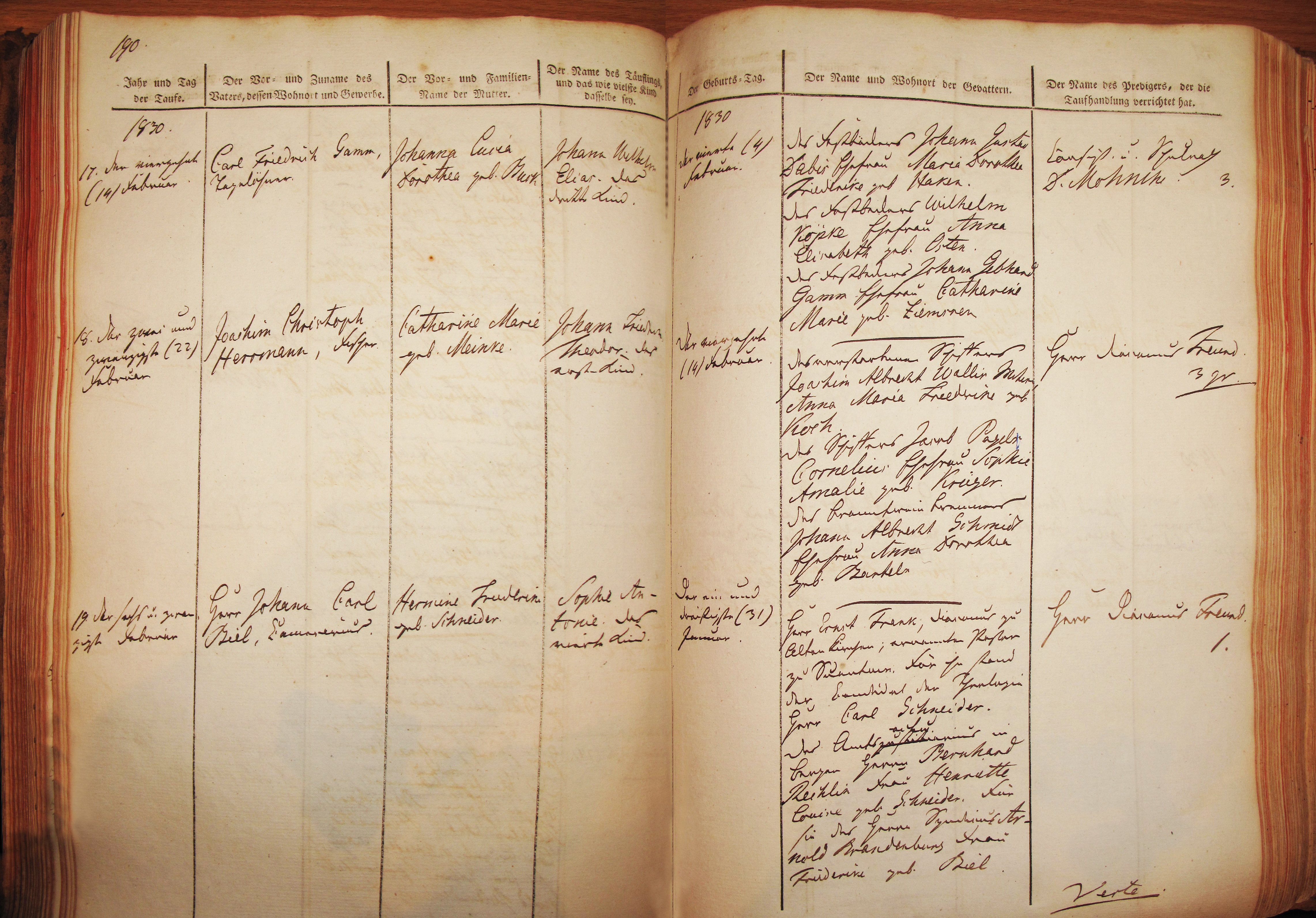 Kirchenbuchseite mit Geburts- und Taufdatum sowie Eltern und Paten von Antonie Biel